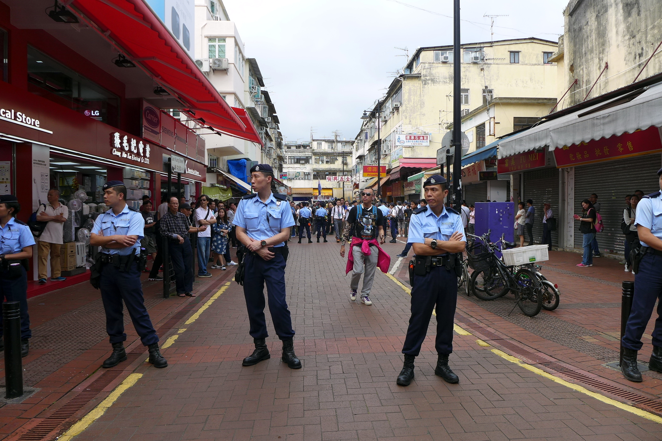 San Kung Street Police Force